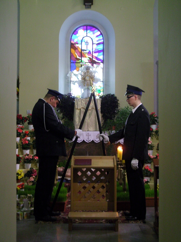 Grób Pański w kościele Imienia Maryi w Bączalu Dolnym na Podkarpaciu. Tradycyjna warta strażaków OSP.